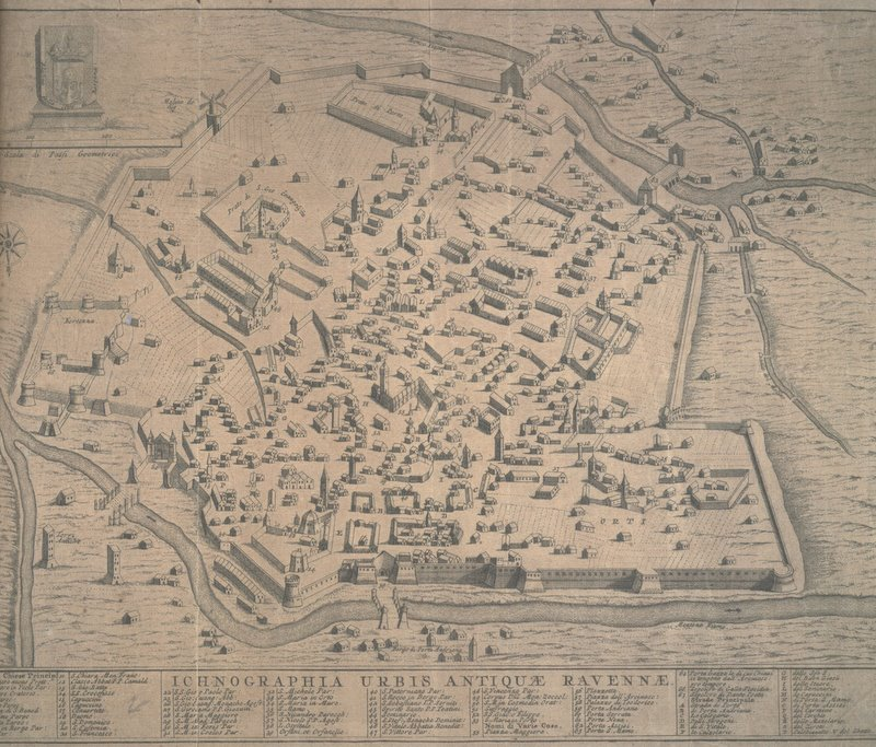 Ichnographia Urbis Antiquae Ravenna. Pianta della città redatta alla fine del XVII secolo.